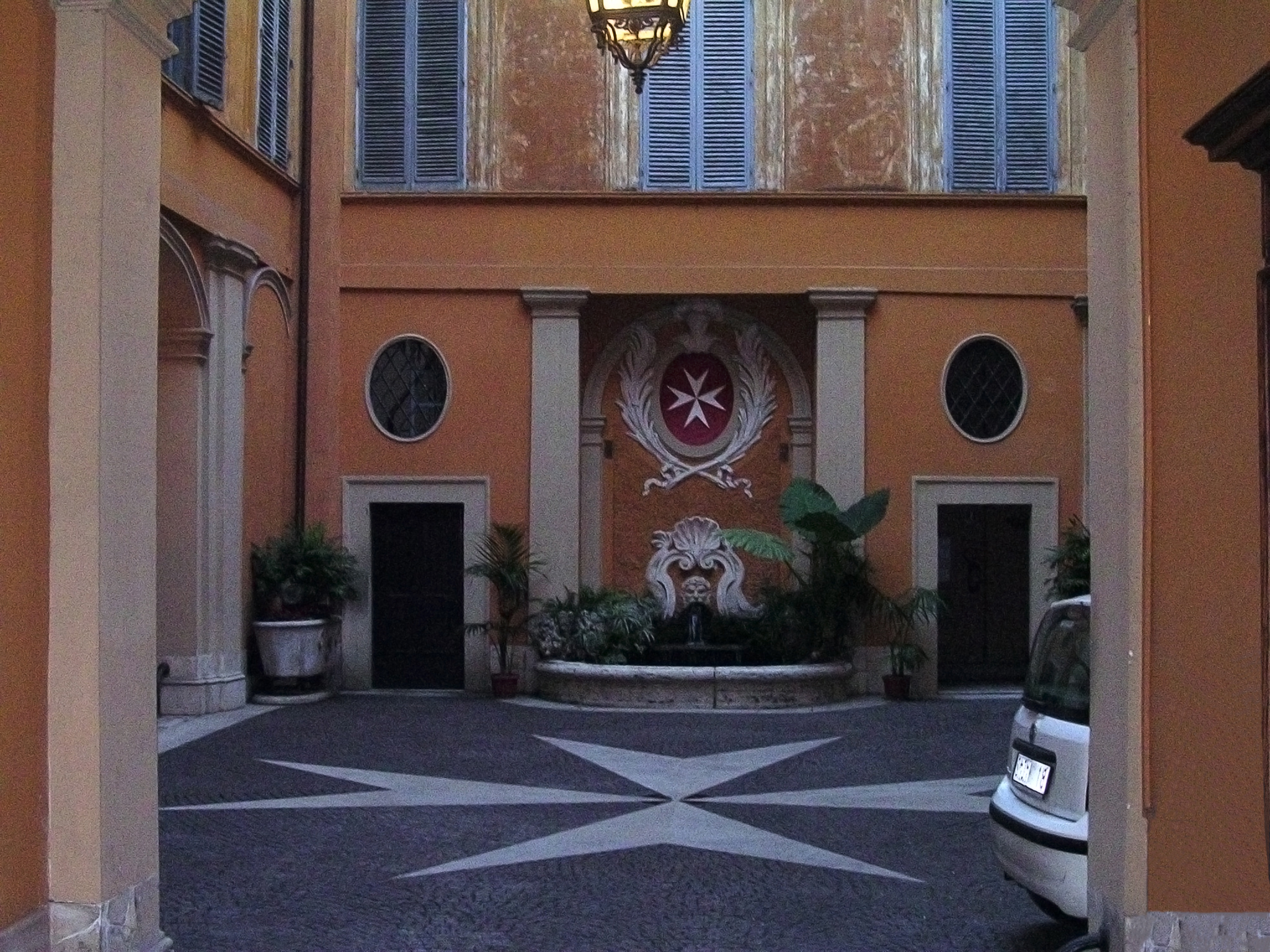 Interior del Palazzo di Malta en Roma, sede de la Orden Soberana de Malta